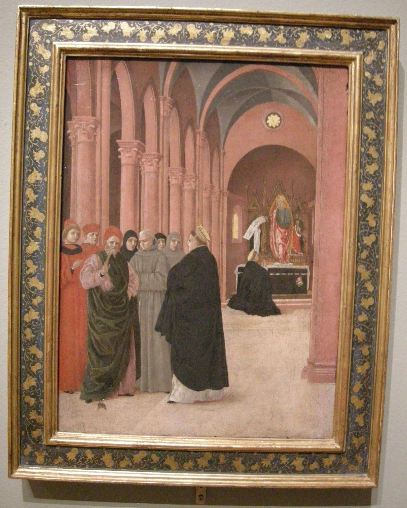 Bartolomeo degli erri, san tommaso d'aquino dibatte con gli eretici, 1465 ca.